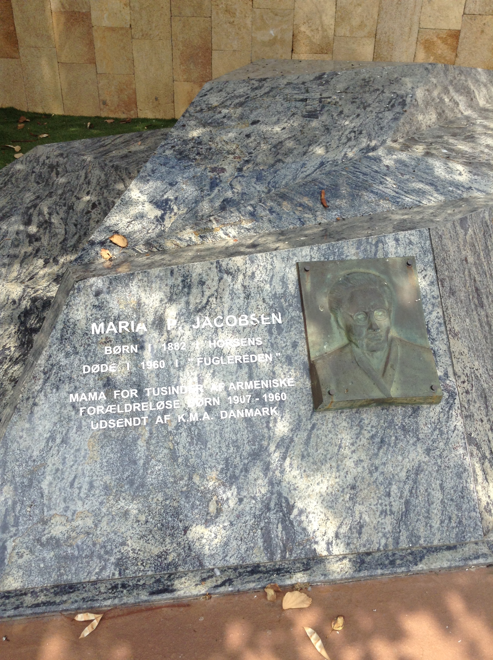 Մարիա Յակոբսենի գերեզմանը